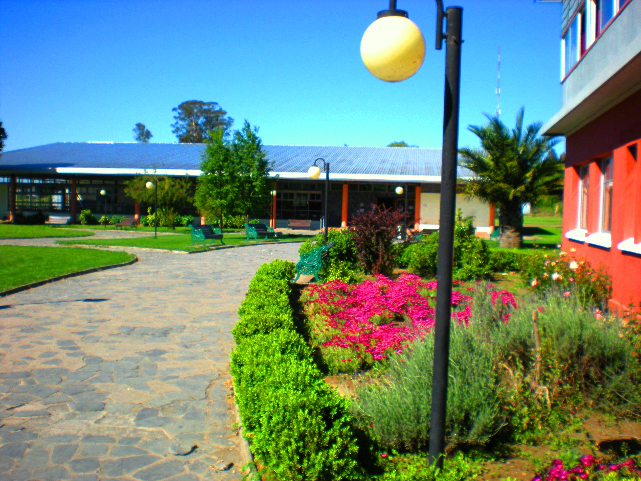 Foto tomada desde el interior de la Universidad Adventista de Chile, ubicada en el kilómetro 12 camino a tanilvoro desde la ciudad de Chillan, Chile